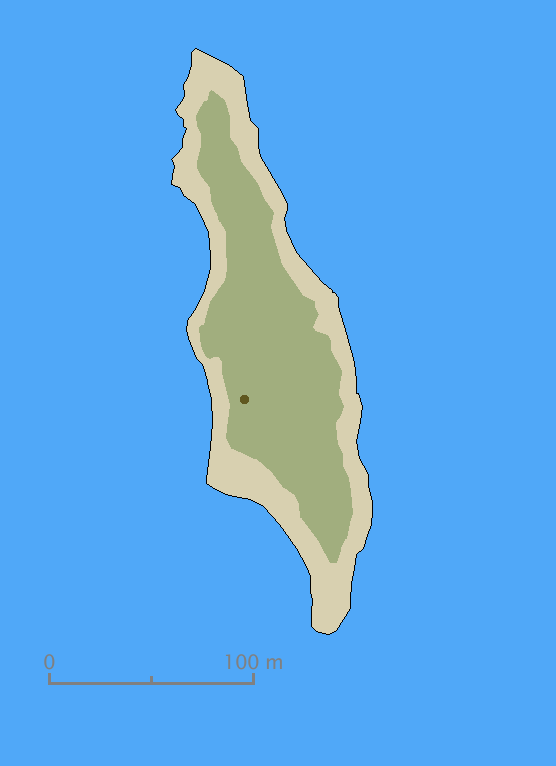 Ostrov Kumbli, přírodní podmínky.